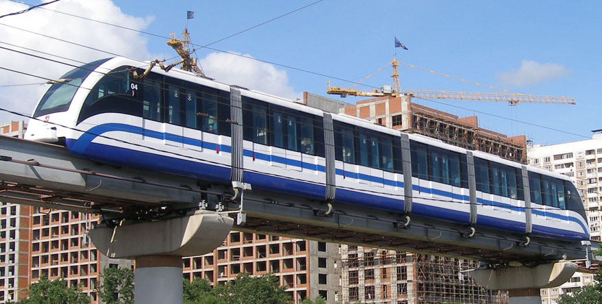 Монорельсовый поезд/Monorail train